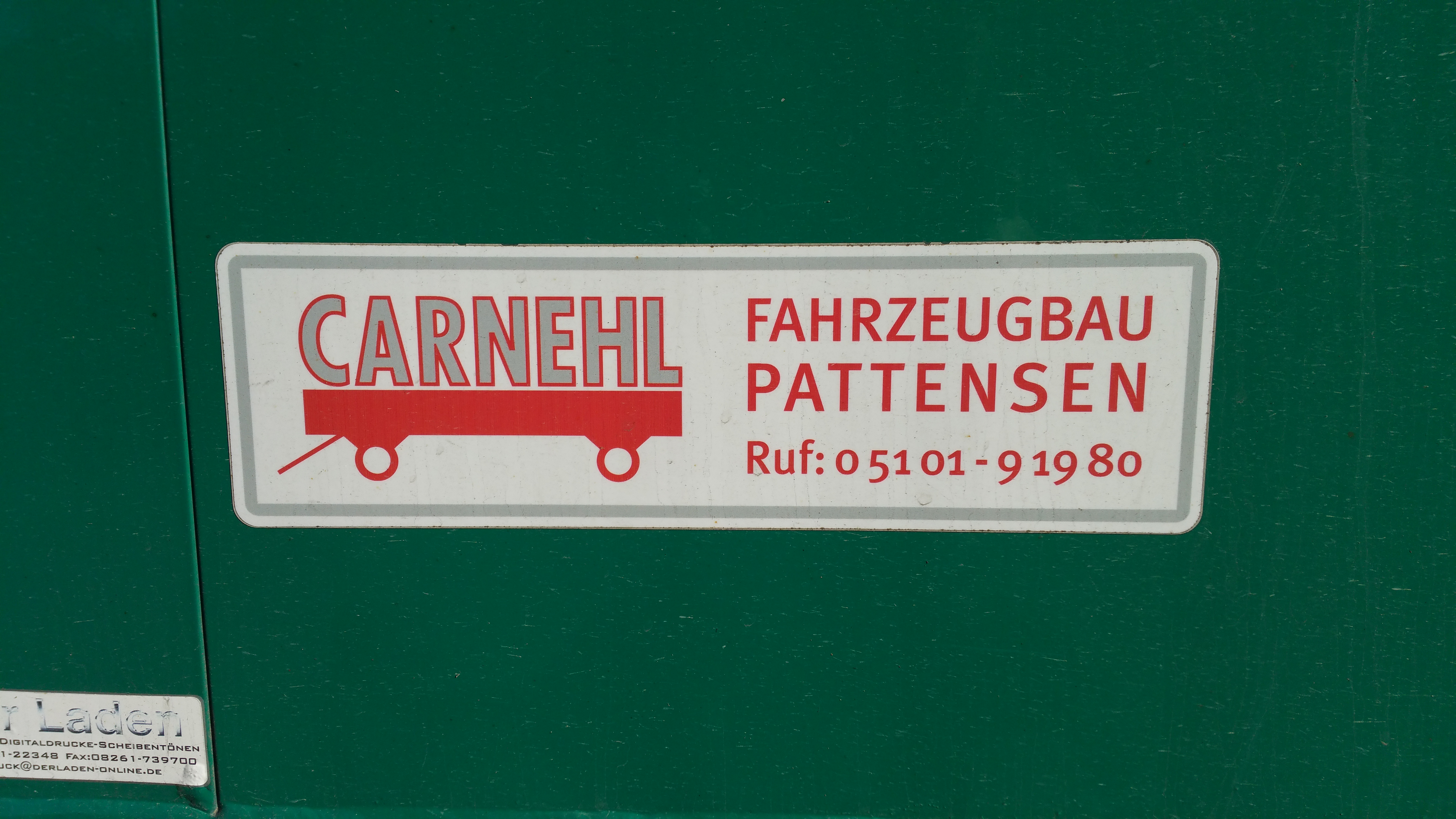 Typschild Carnehl Fahrzeugbau auf einem Auflieger